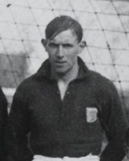 Uitsnede van Jelle Blinkhof tijdens het seizoen 1918/19.